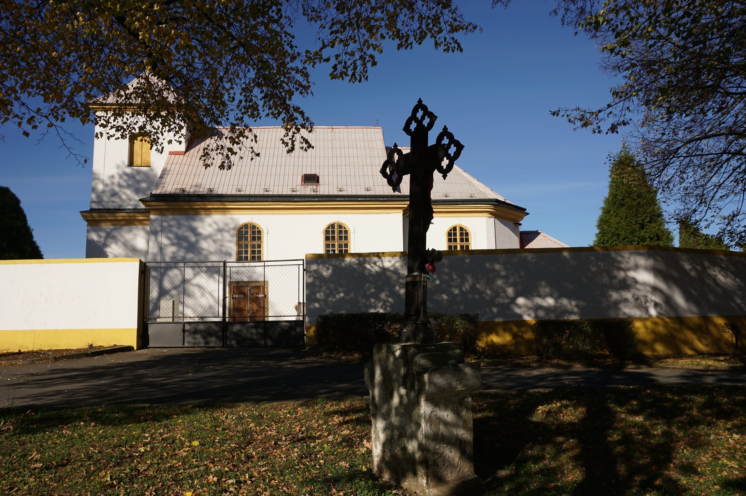 Kostel Všech svatých, Kozly (Tišice).